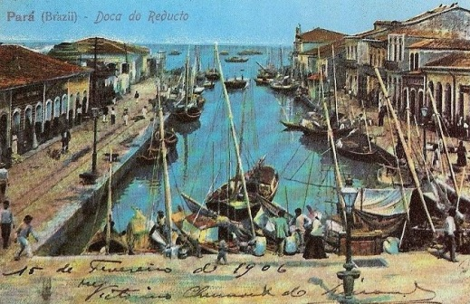 Pintura em aquarela do antigo Igarapé das Almas, no Reduto Antigo, Belém do Pará.